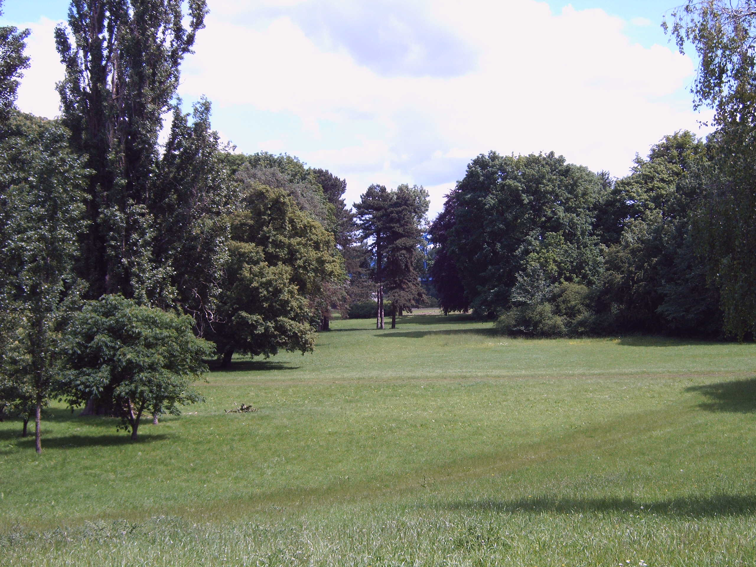 Parkanlage Klosterbergegarten in Magdeburg Bild aufgenommen am 2.6.2006